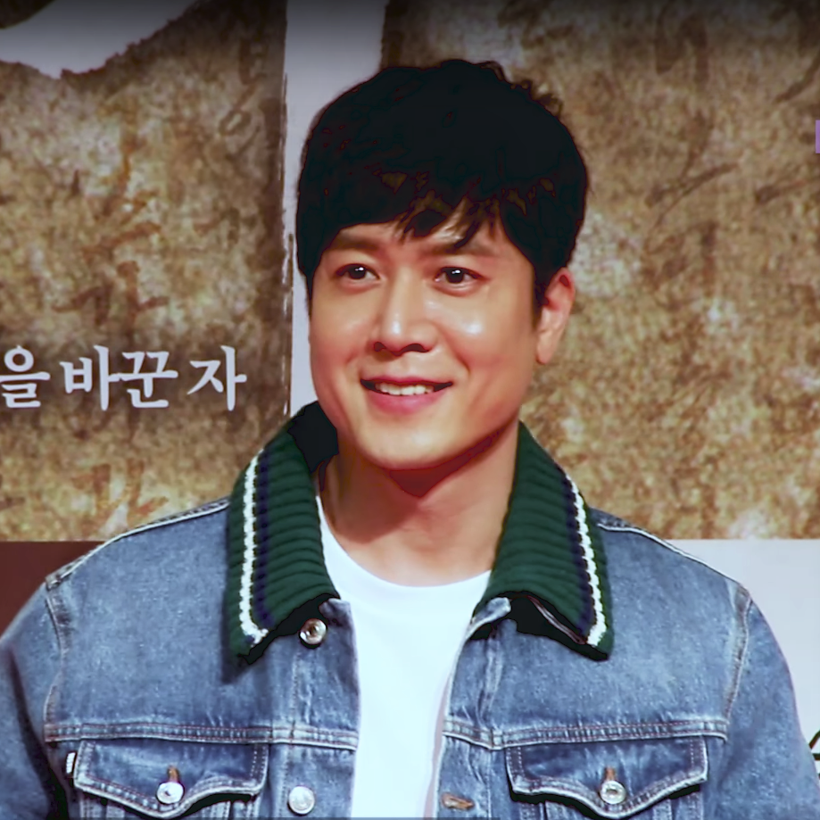 영화 '흥부' VIP시사회 포토월